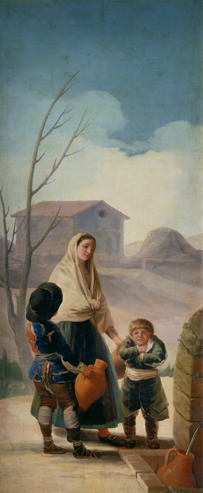 Cartones para tapices.